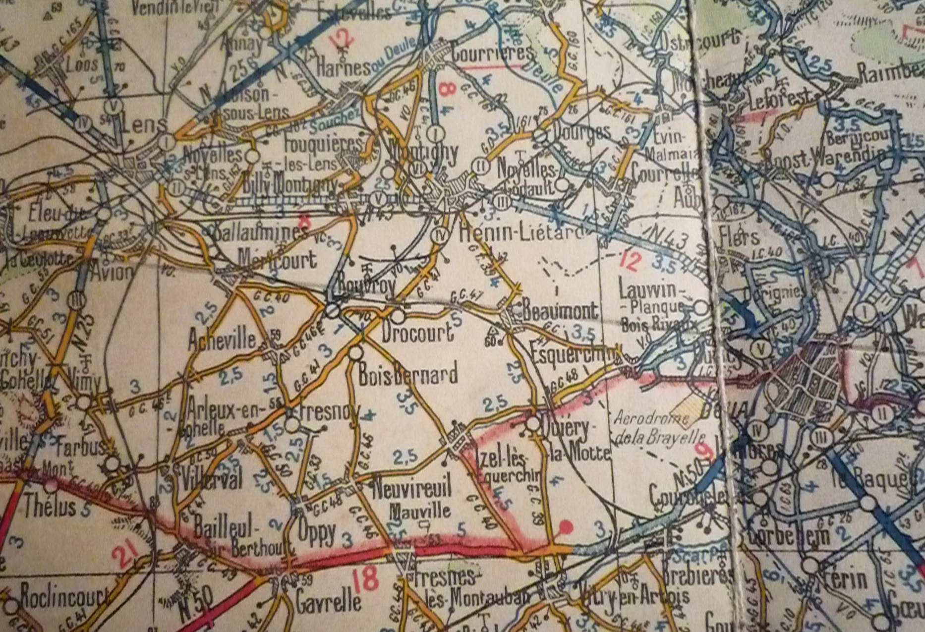 Tracé de l'ancienne Ligne Lens - Corbehem, Nord-Pas-de-Calais, France